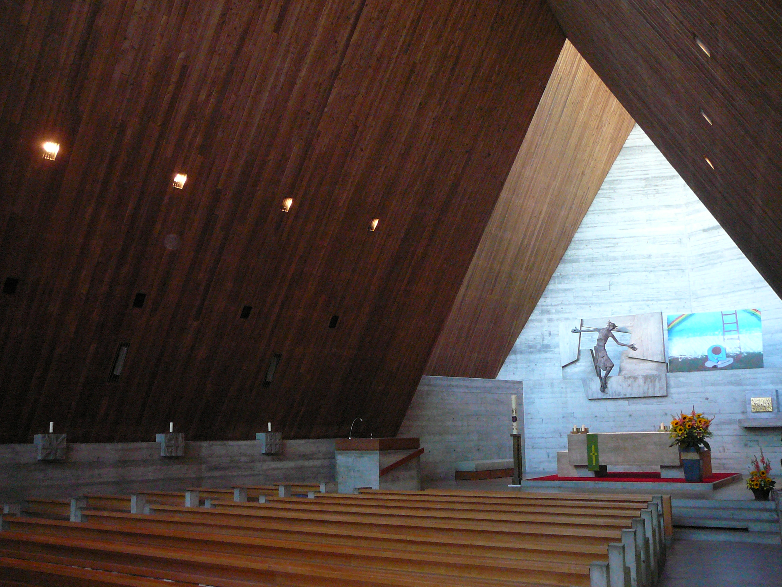 Römisch-katholische Pfarrkirche St. Paulus Dielsdorf, innen